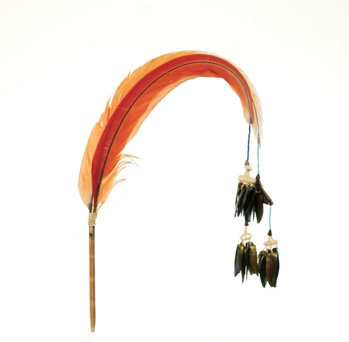 Ornament. Dit object is verzameld tijdens de Toemoekhoemak Expeditie van 1907.. Veren dansversiering